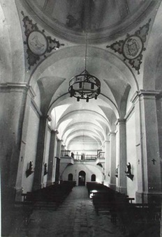 Vista de la nave dsde el altar